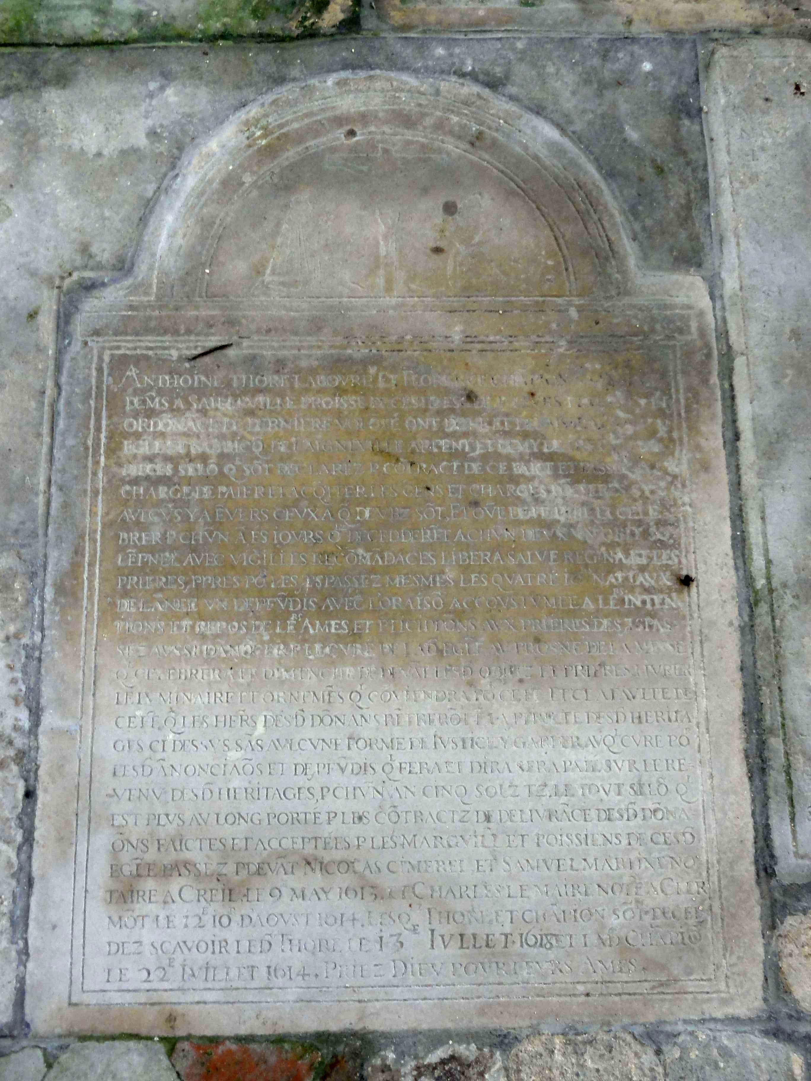 Plaque de fondation d'Antoine Thoré, laboureur, et de Florence Champion, sa femme, vers 1615.